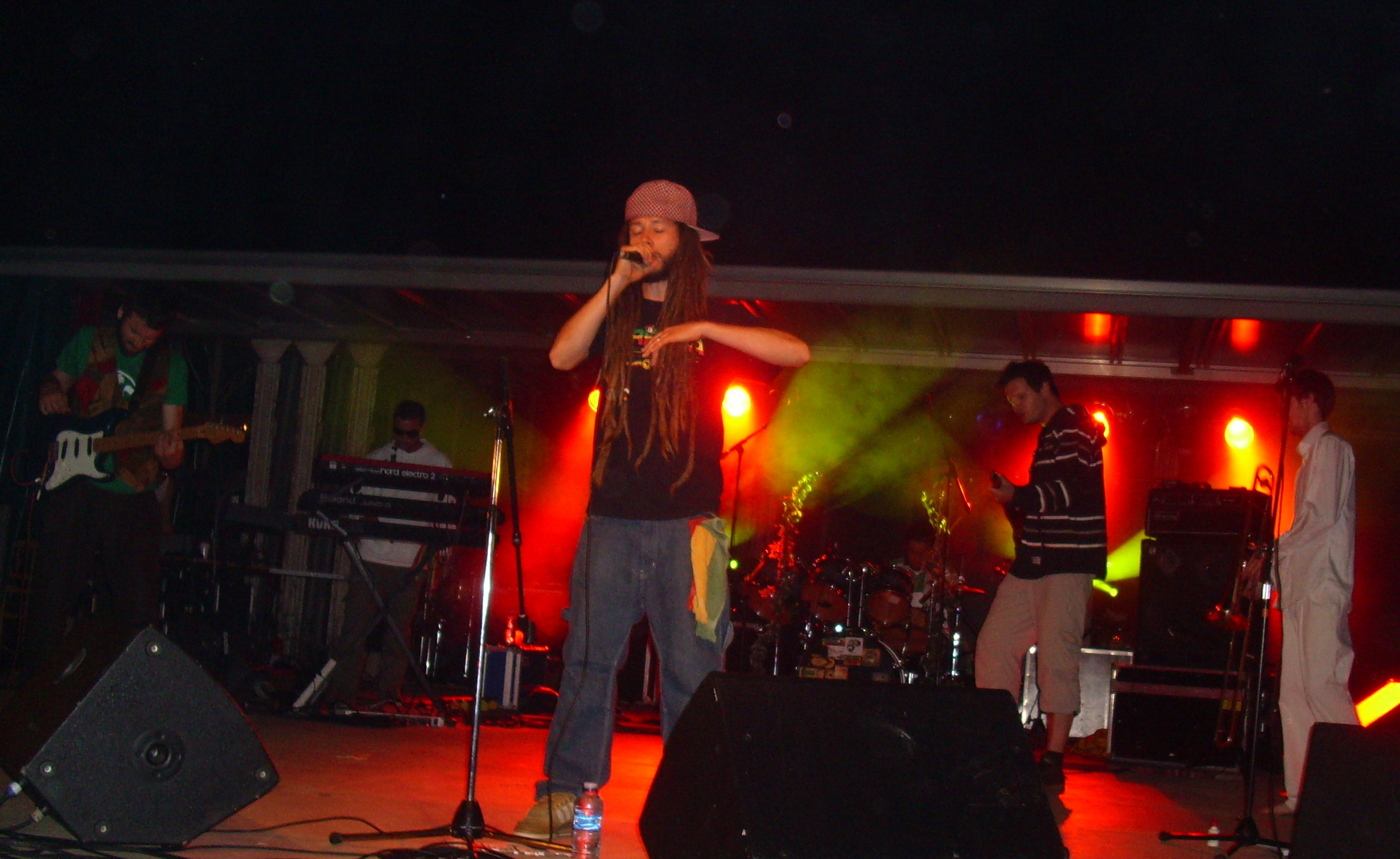 Danakil lors du festival de Verjus (71)